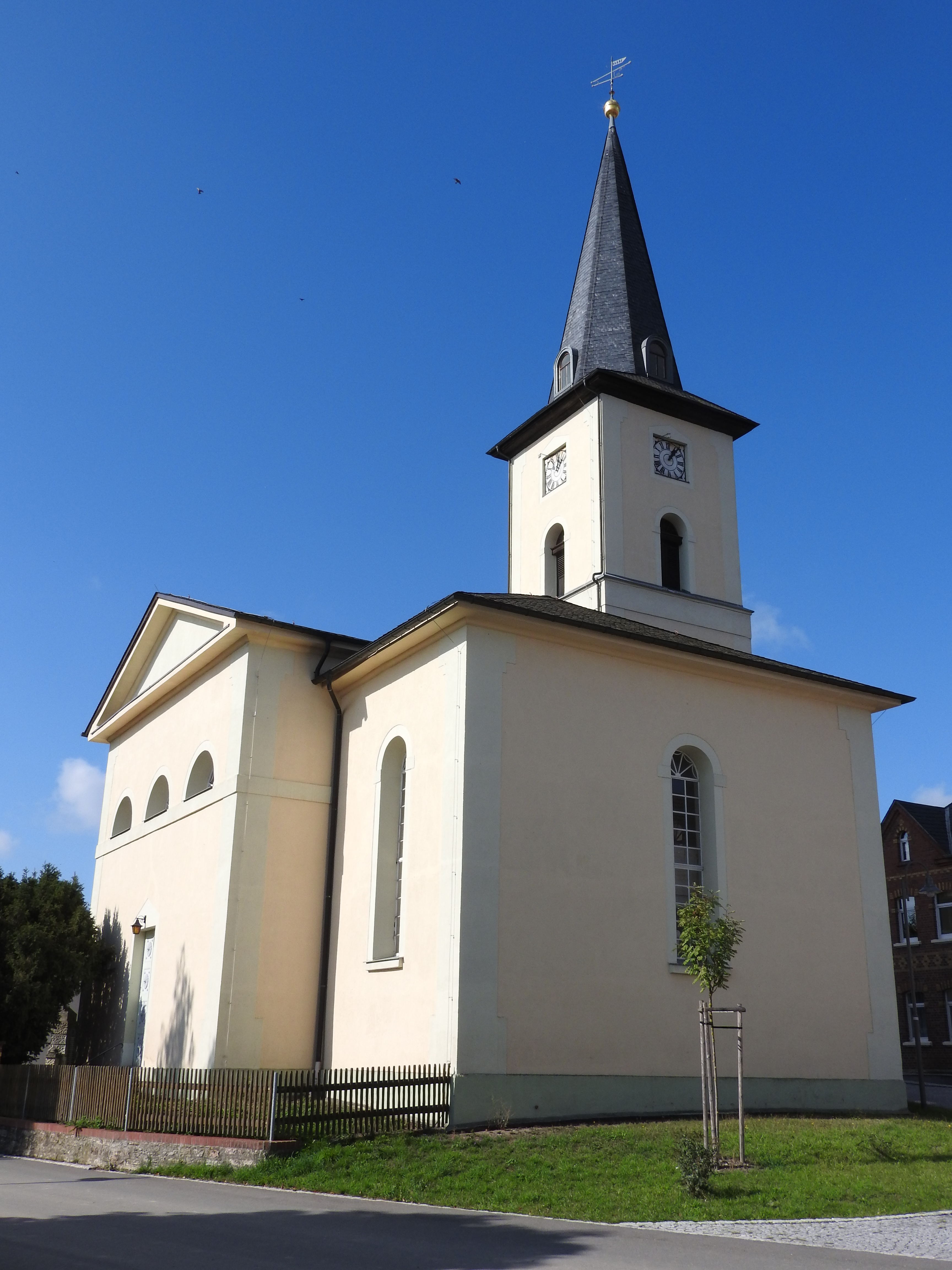 Kirche von Pörmitz, Thüringen